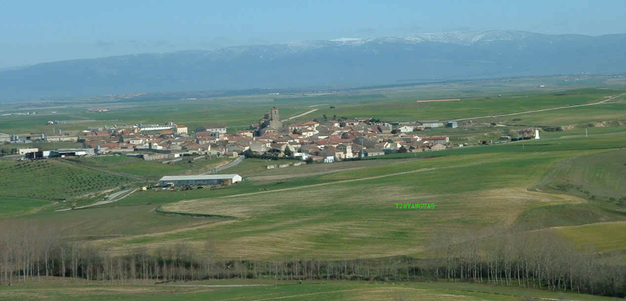 Vista general de Yanguas de Eresma (Segovia) Para colocar en el articulo de Wikimedia